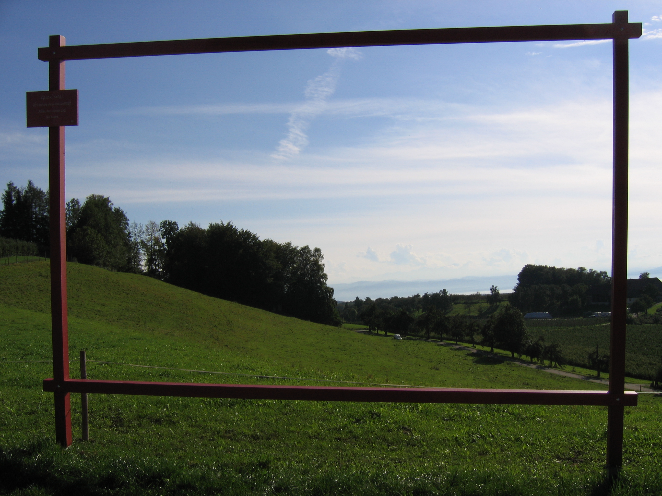 Deutschland - Baden-Württemberg - Bodenseekreis - Tettnang - Dieglishofen: Guck-mal-Rahmen